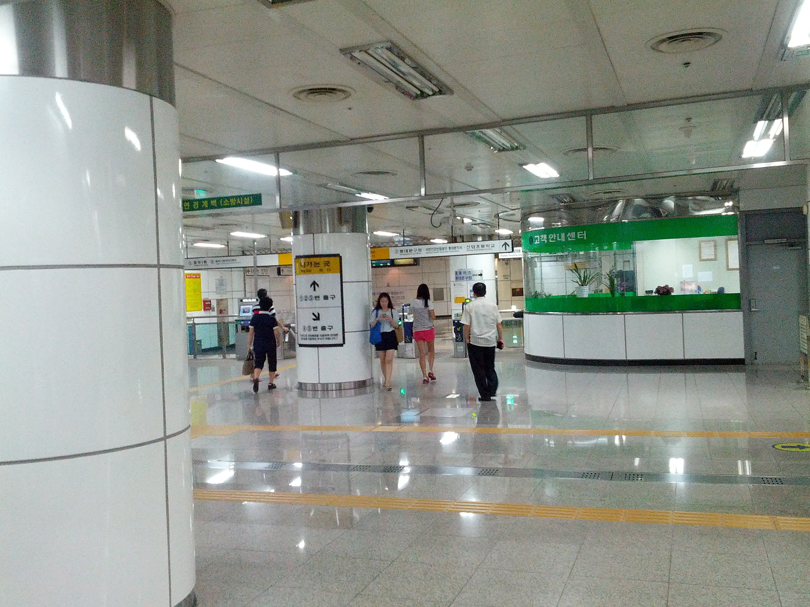 용두역 승강장